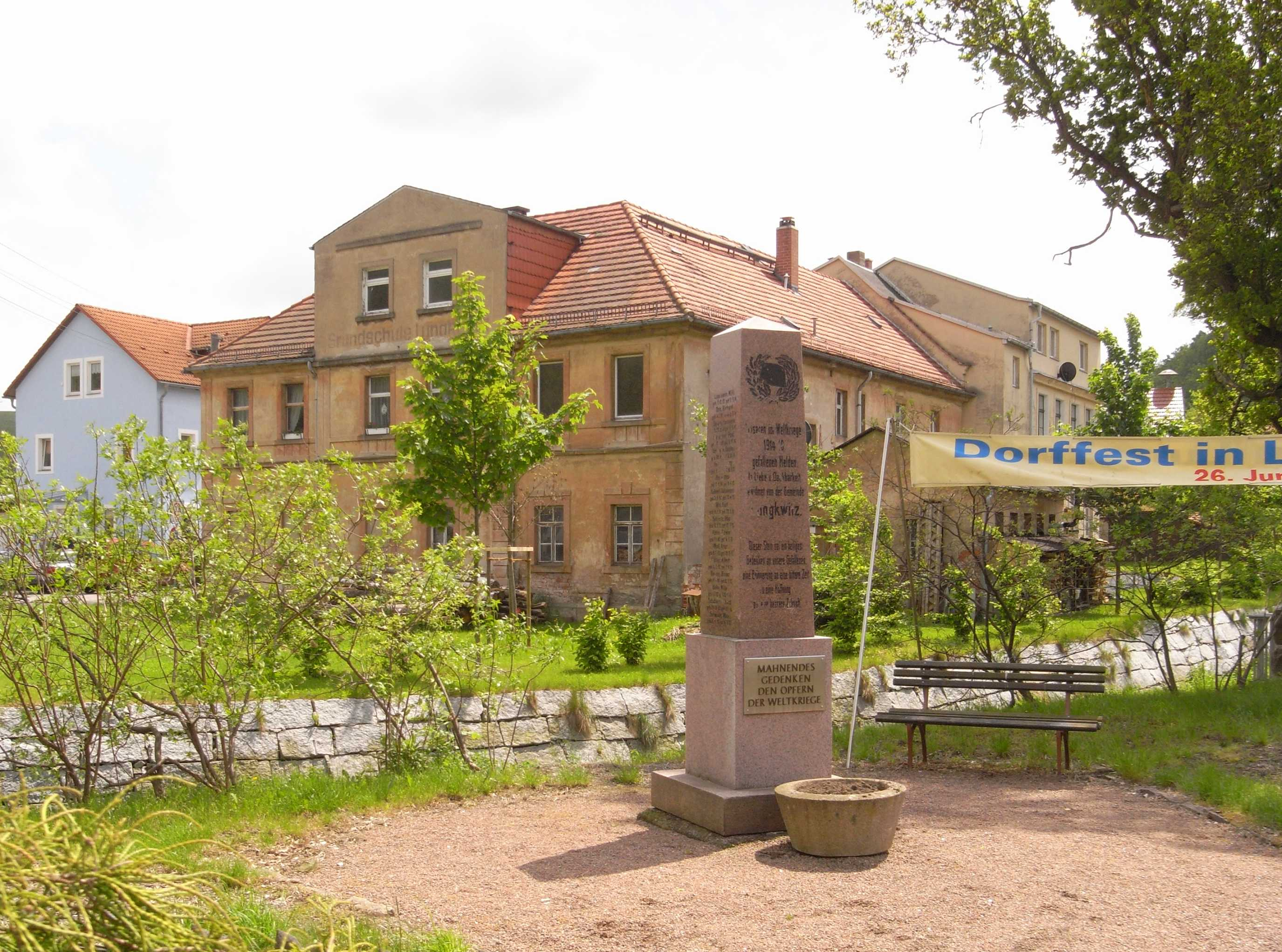 Kreischa-Lungkwitz, Denkmal (aus Meissner Granit) für die Gefallenen der Weltkriege (Sachsen, Deutschland)